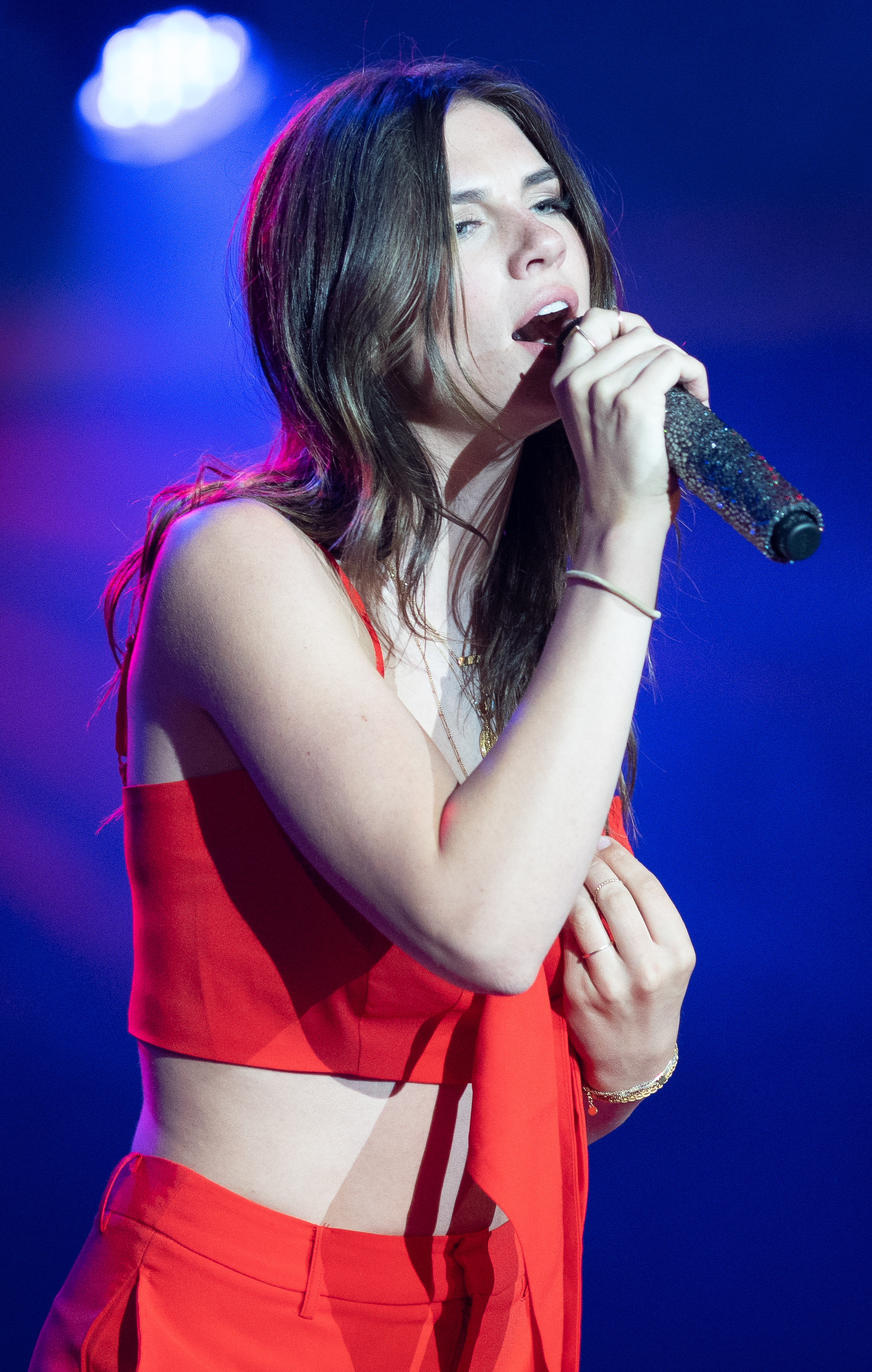 Het Promsconcert van de Night of the Koemarkt op 30 juni 2018 in Heerenveen. De artiest in beeld is Maan.